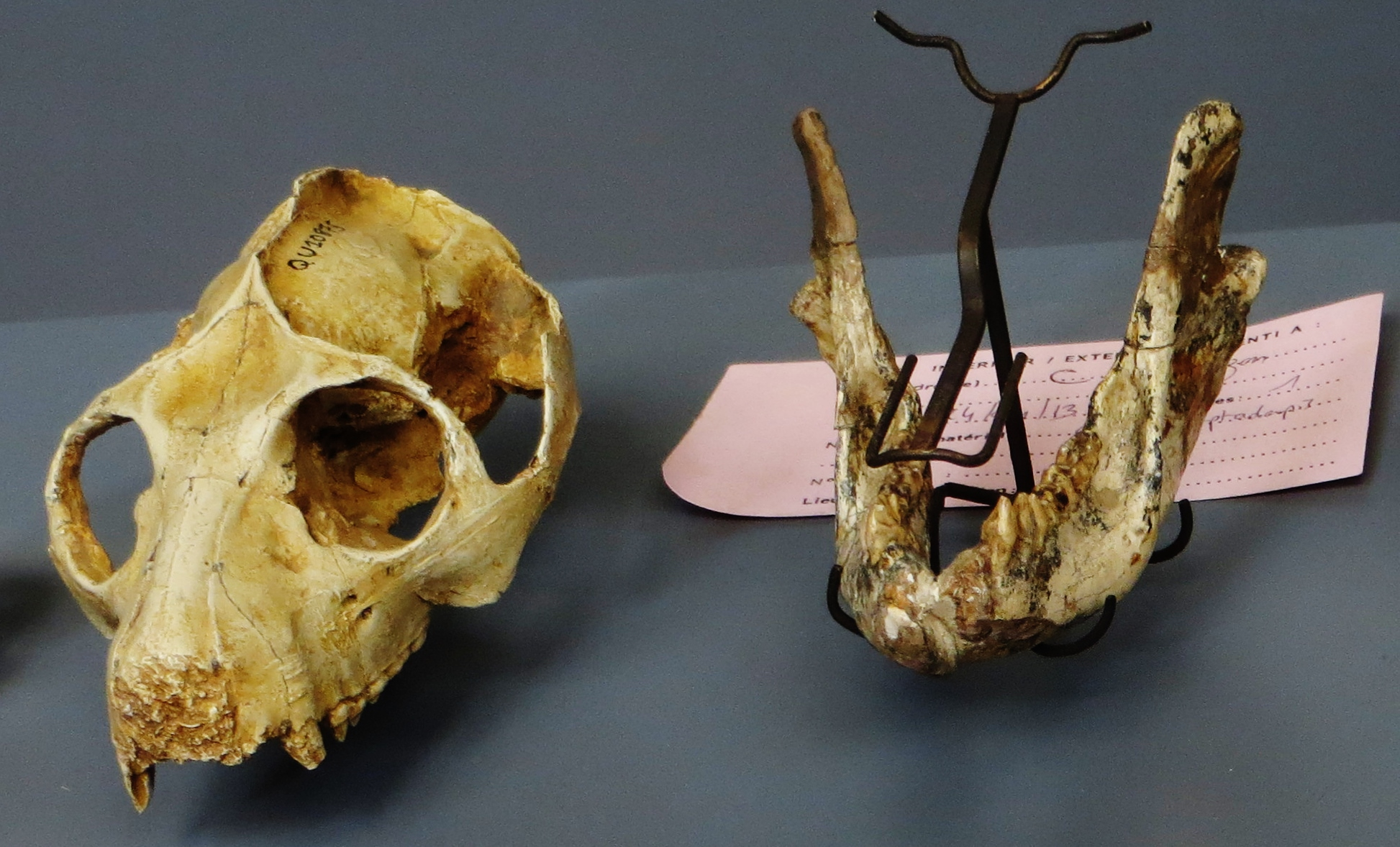 Fossil of Leptadapis, an extinct mammal - Took the picture at Musee d'Histoire Naturelle, Paris